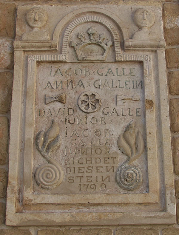 Erinnerungstafel am Wohnhaus der Geistermühle, Uffhofen